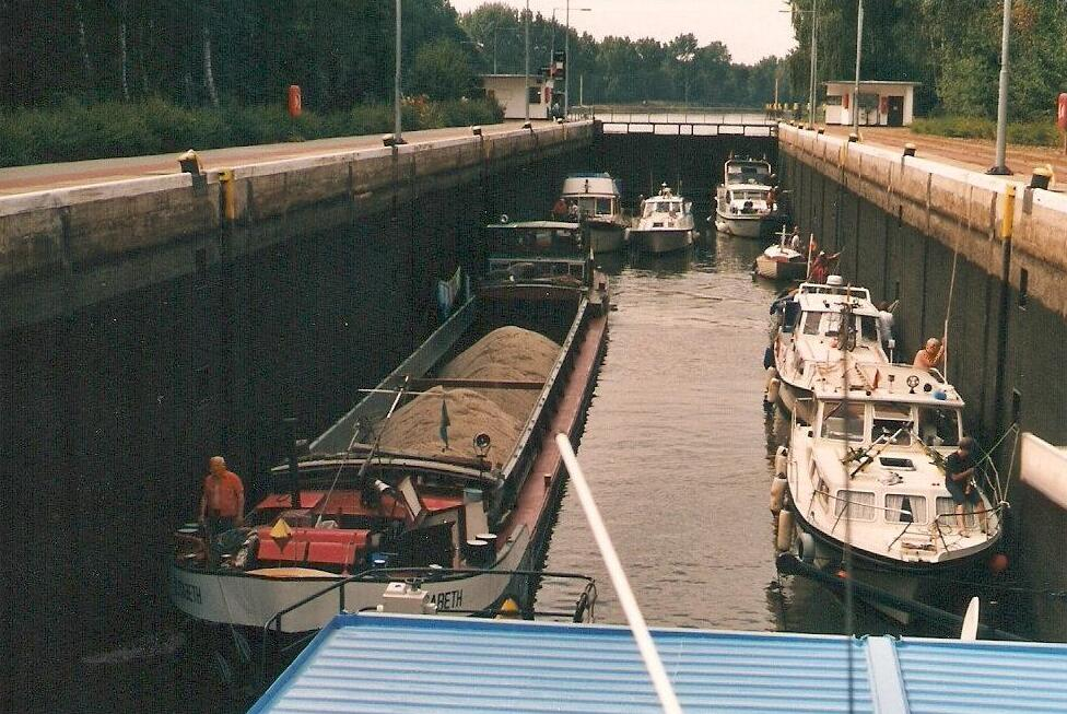 Die Schleuse Zerben im Elbe-Havel-Kanal im Sommer 1998 mit Schubverband, Finowmaßschiff und Sportbooten